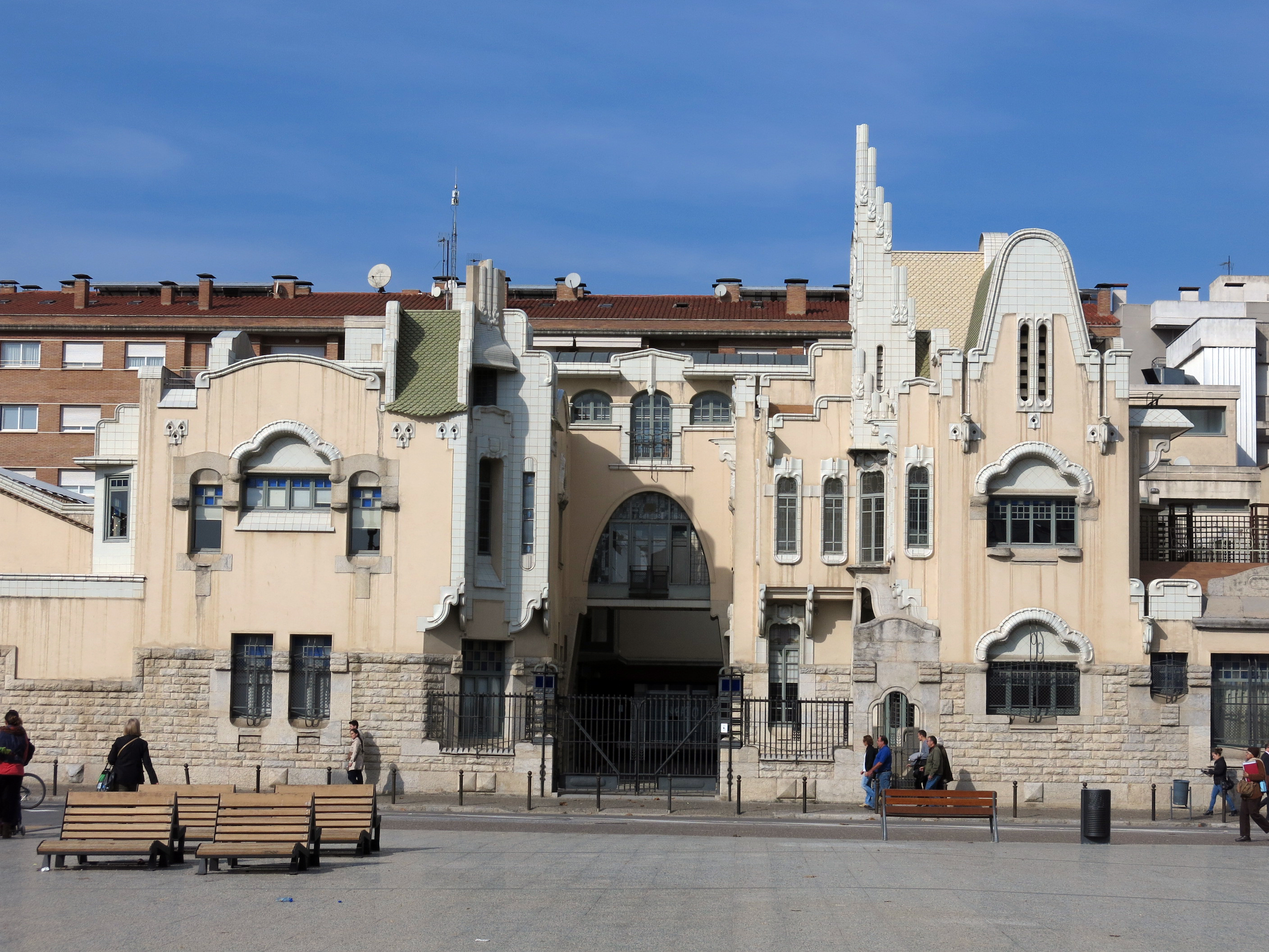 Farinera Teixidor (Girona)